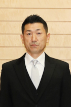 赤間二郎（内閣府副大臣）